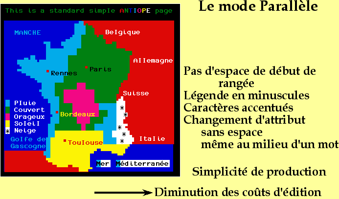 Extrait d'un cours donné à l'Université de Paris Dauphine sur l'histoire du Vidéotex : Page test en mode parallèle.